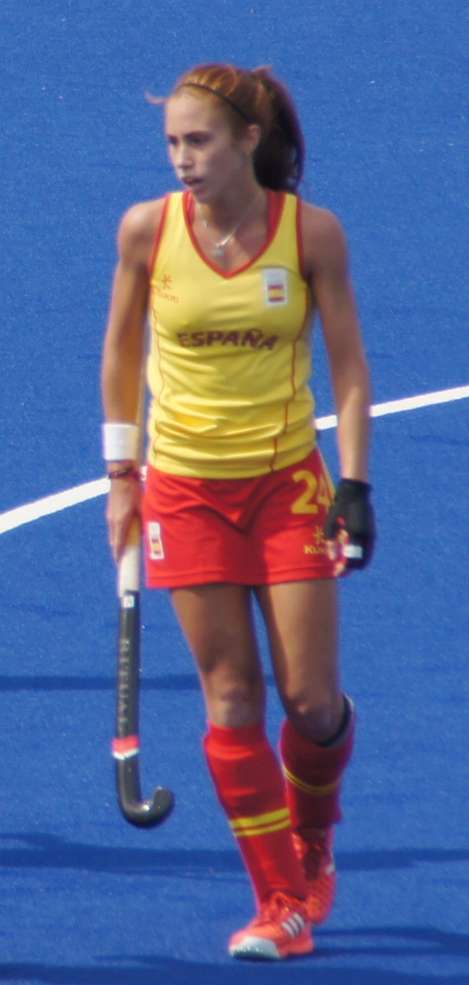 Rio 2016.Hóquei na grama. Feminino. Holanda x Espanha. 42